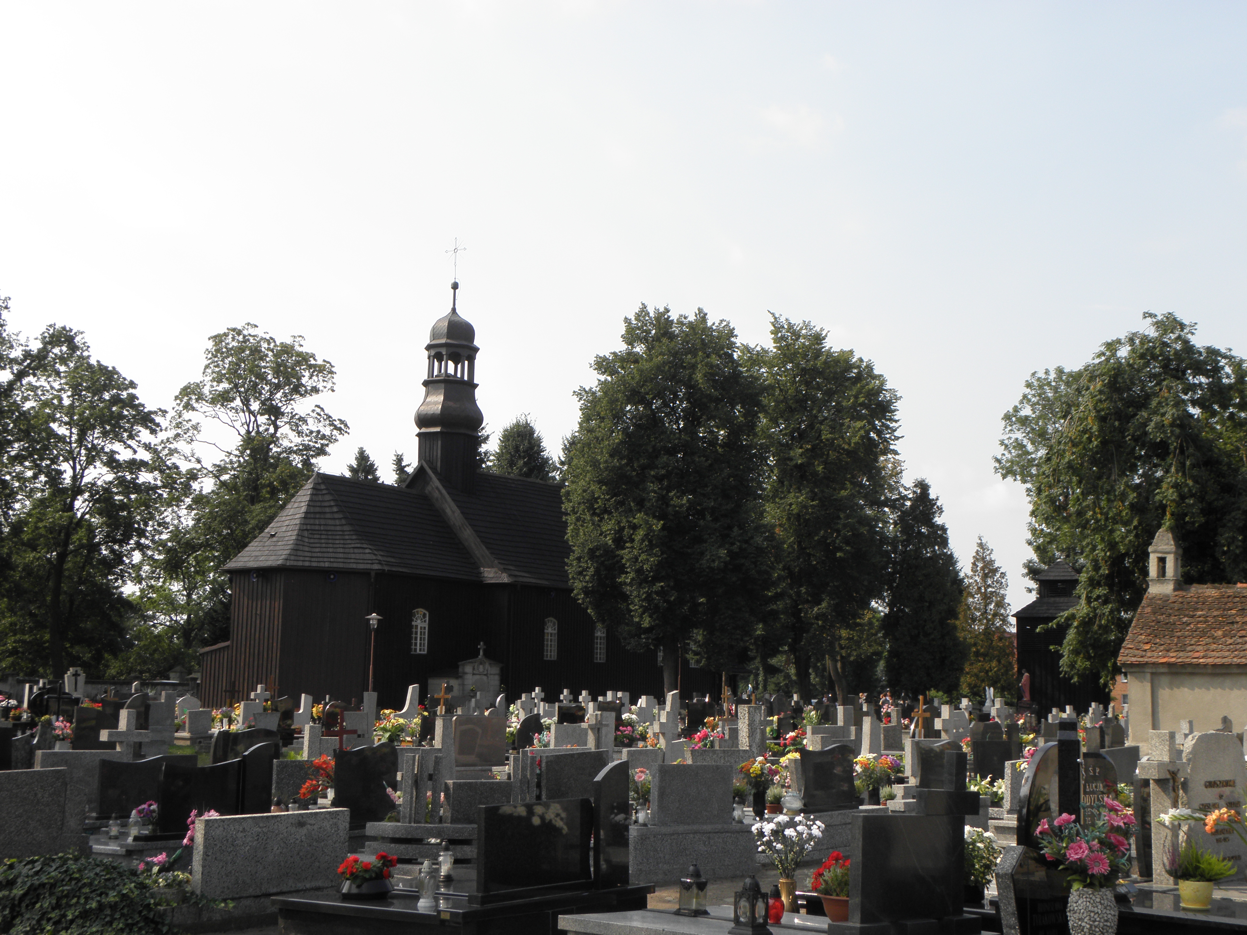 kościół par. p.w. Narodzenia NMP, 1785